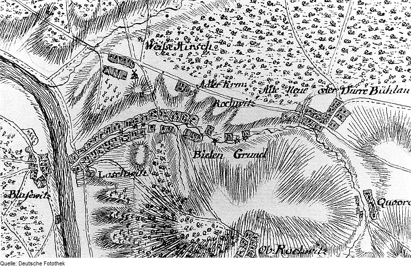 Original image description from the Deutsche FotothekDresden-Weißer Hirsch. Ausschnitt aus: Karte von einem Teil des Kurfürstentums Sachsen, Petri, nach 1759 (Sign.: VII 63)